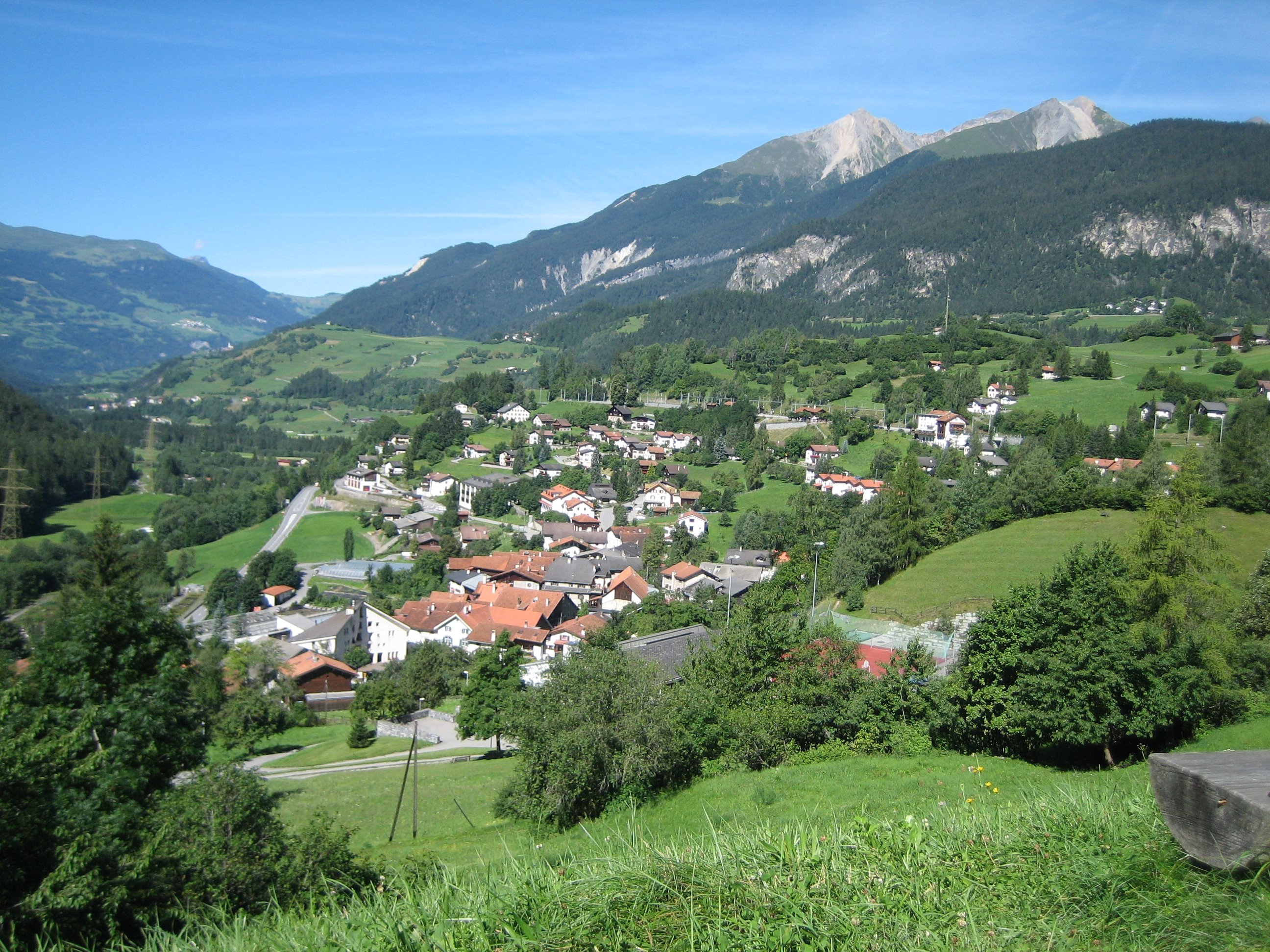 Filisur